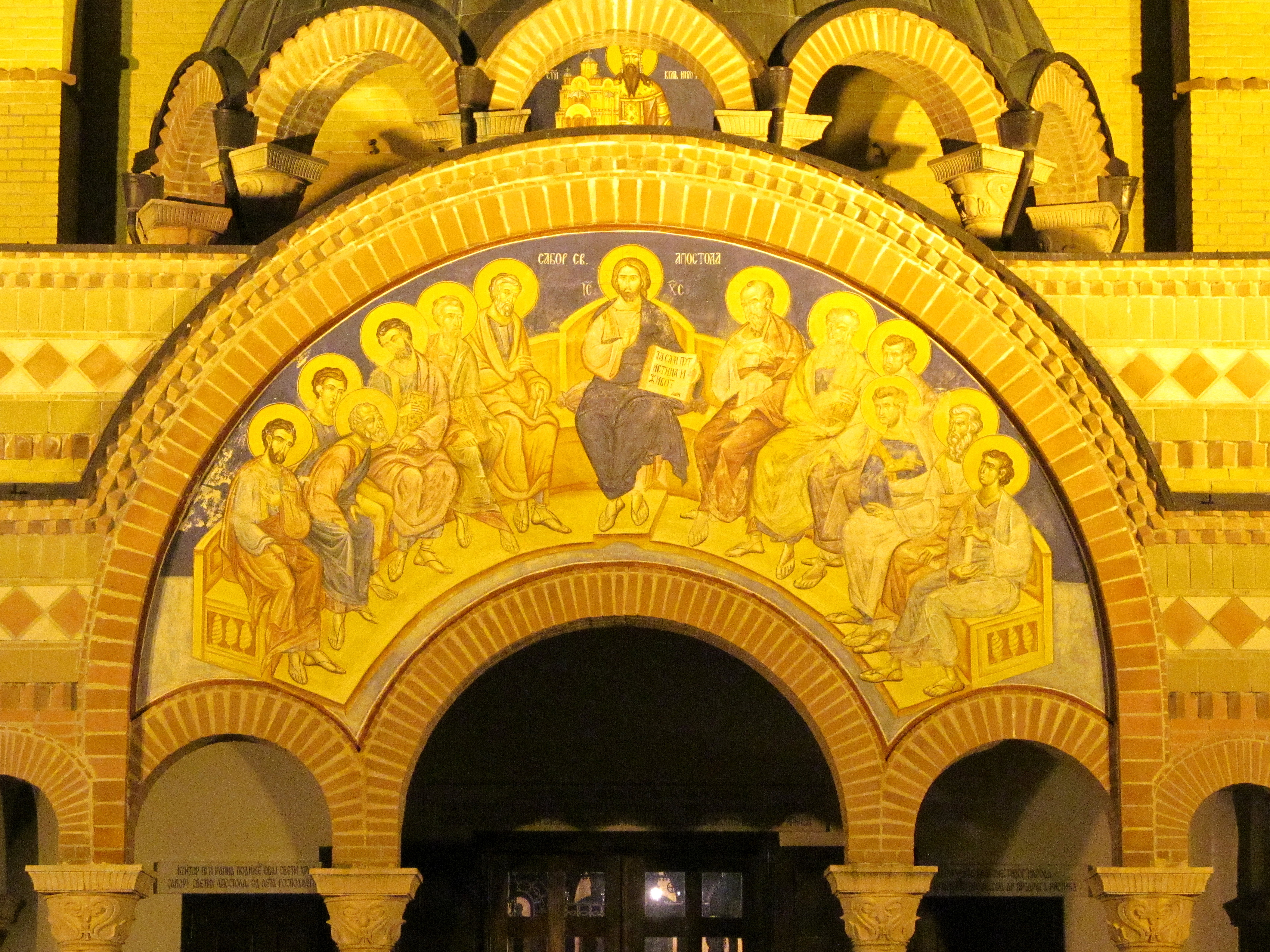 Фреска у лунети изнад главног портала која представља Христа у средини, са чије се леве и десне стране налазе фигуре по шест апостола (Христ и 12 апостола).